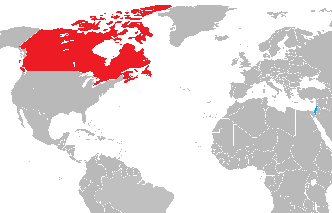 Israel-Canada locator